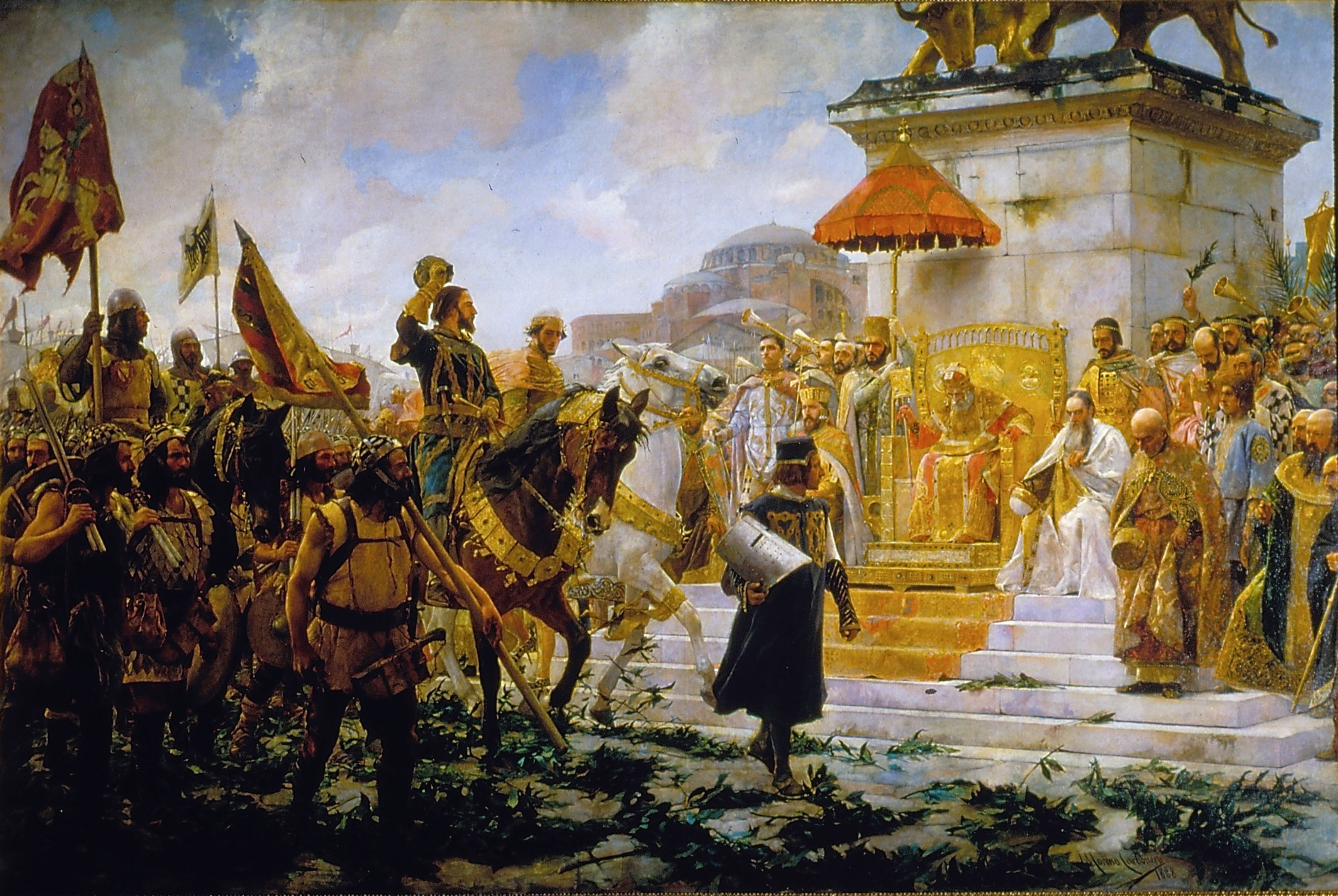 El lienzo representa la entrada del mercenario de origen italiano Roger de Flor en la ciudad de Constantinopla al frente de sus mercernarios catalanes, que en conjunto eran conocidos como la Gran Compañía Catalana, para socorrer al emperador bizantino Andrónico II Paleólogo en su lucha contra los turcos otomanos. En 1303 Roger de Flor se puso al servicio del mencionado emperador con el propósito de ayudarle y al mando de una expedición de 4000 almogávares, 1500 soldados de caballería y 39 naves enviada por Federico II de Sicilia, (la Gran Compañía Catalana). Y al entrar en la capital del Imperio Bizantino Roger de Flor desfiló al mando de los almogávares, que le tenían una gran estima, ante el emperador, y hallándose al frente de sus hombres aniquiló a los genoveses de Constantinopla y posteriormente se dirigió a Anatolia y tomó las ciudades de Filadelfia, Magnesia y Éfeso, rechazando a los turcos hasta Cilicia y los Tauro (1304), y siempre en batallas libradas con una inferioridad numérica destacada por su parte.